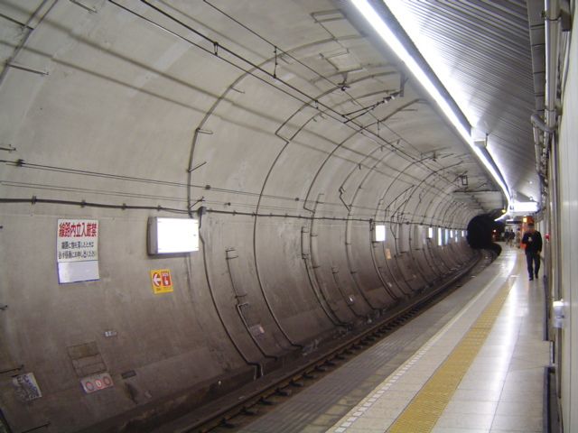 高輪台駅西馬込方面ホーム（2006年4月16日撮影）